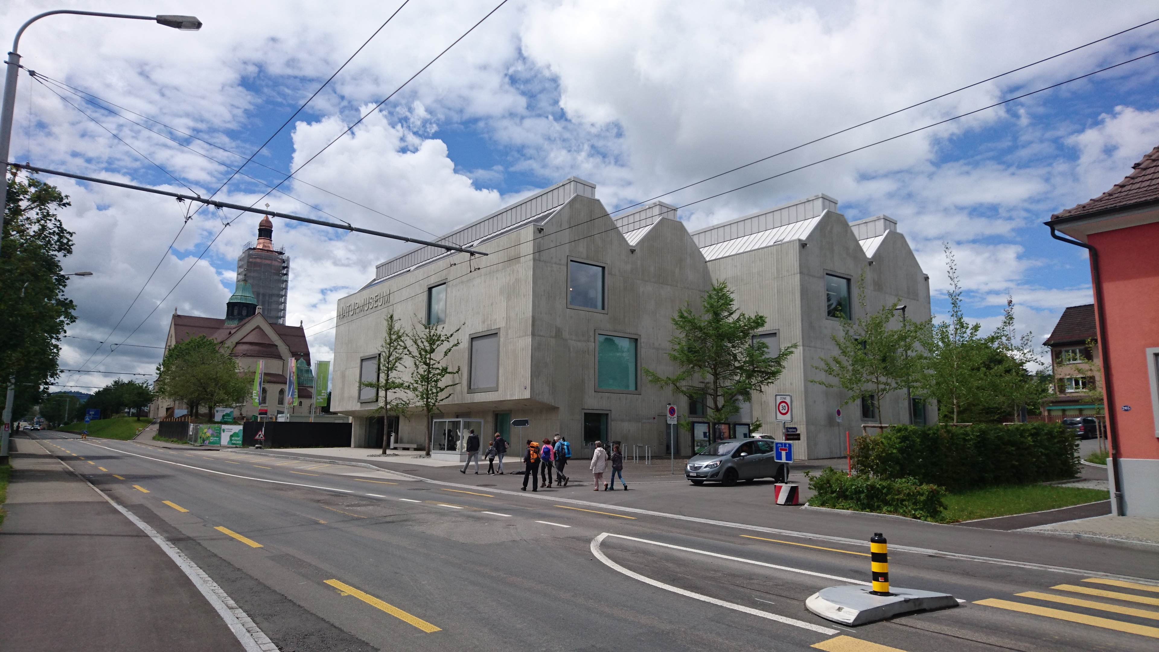 Das neue Naturmuseum von St. Gallen und die in Renovation befindliche Kirche St. Maria Neudorf von Osten von der Rorschacherstrasse her gesehen.